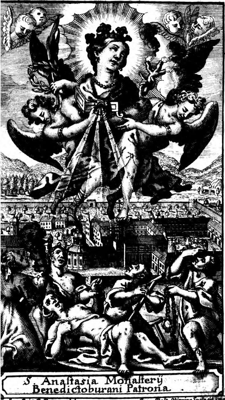 Illustration in P. Karl Meichelbecks Anastasia-Buch: Die hl. Anastasia als Schutzpatronin von Benediktbeuern